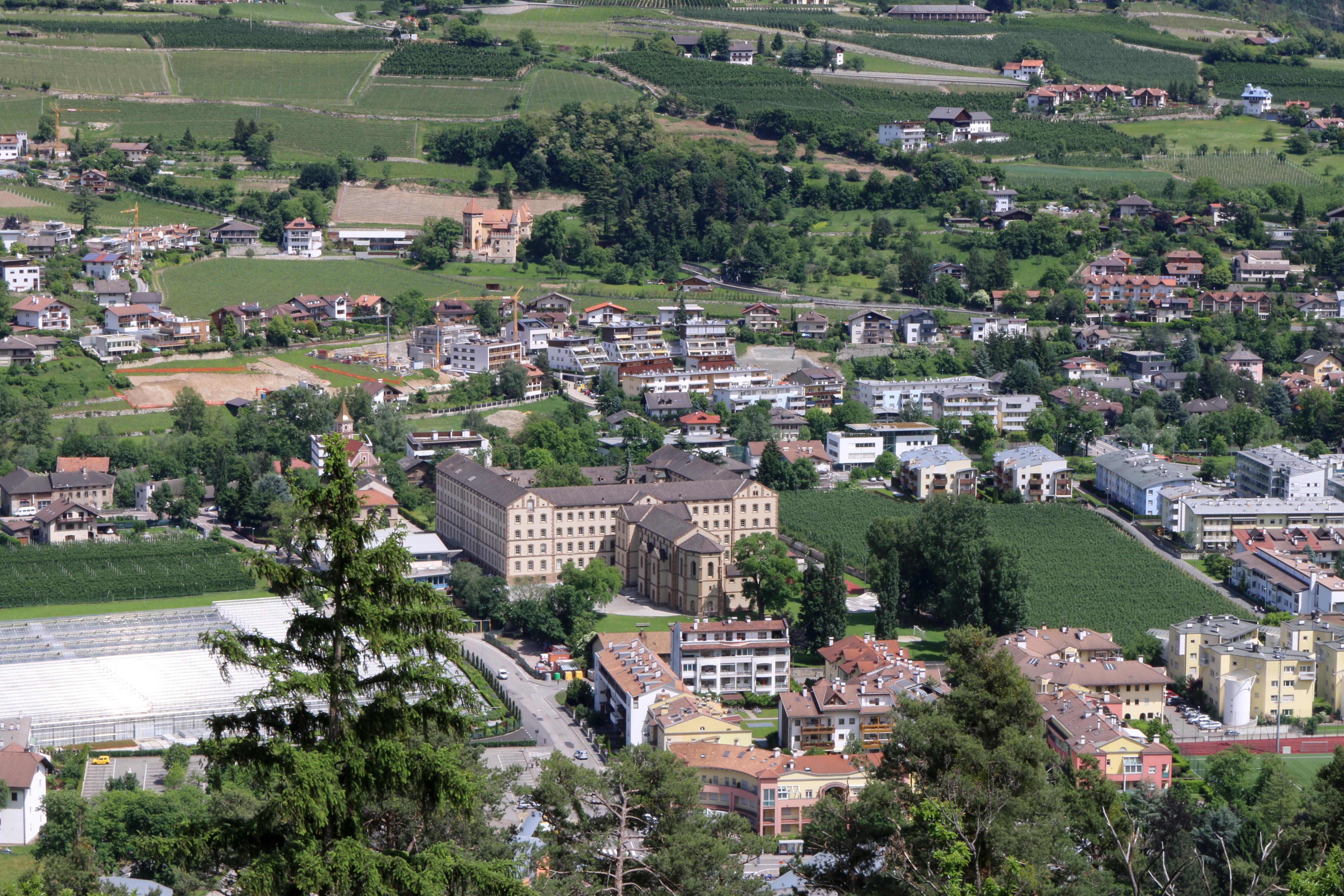 Brixen, Südtirol: Vinzentinum